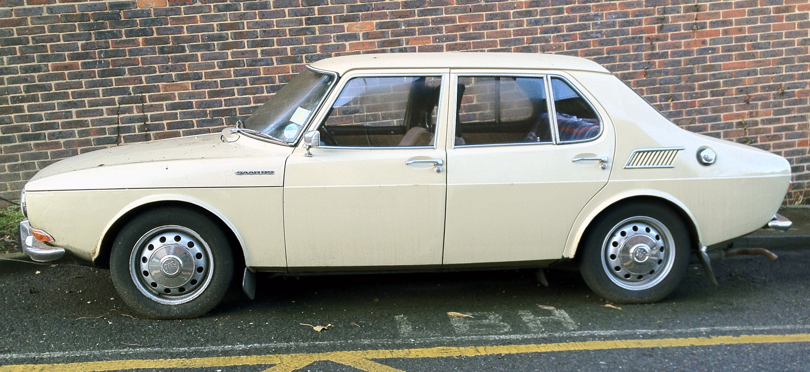 1970 Saab 99 four-door sedan (UK, RHD)